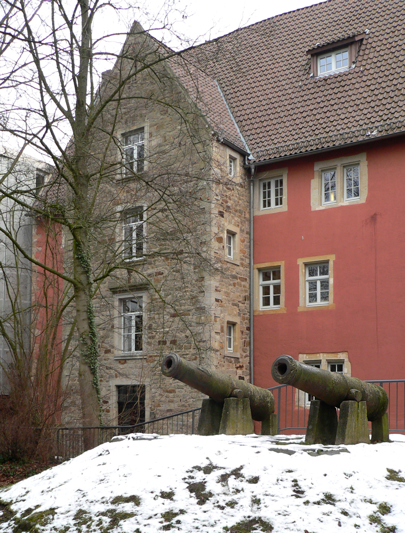 Kanonen zwischen der Eulenburg und den Wällen der Stadtbefestigung Rinteln, der Treppenhausanbau stammt von 1904